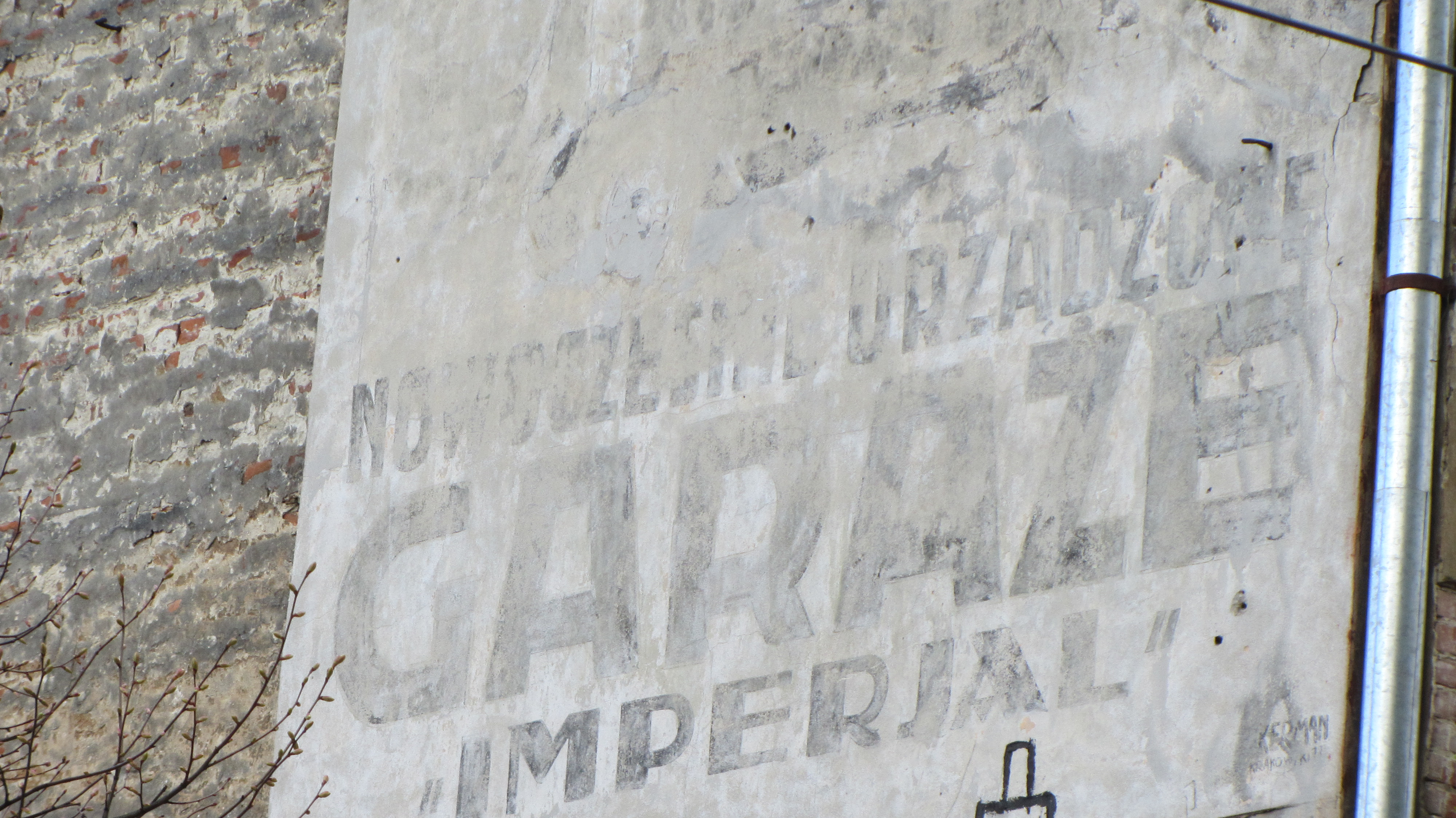 Реклама на торці буд. №49, вул. Зелена, Львів: Nowoczesnie urządzone GARAŹE "IMPERJAL"